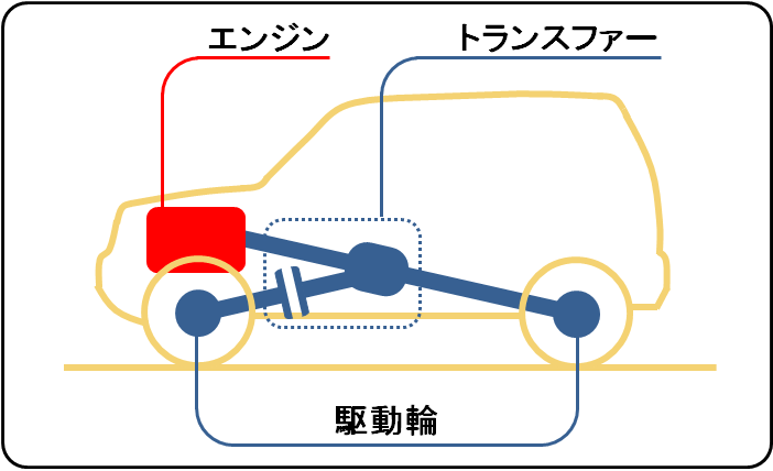 パートタイム四駆の概略図